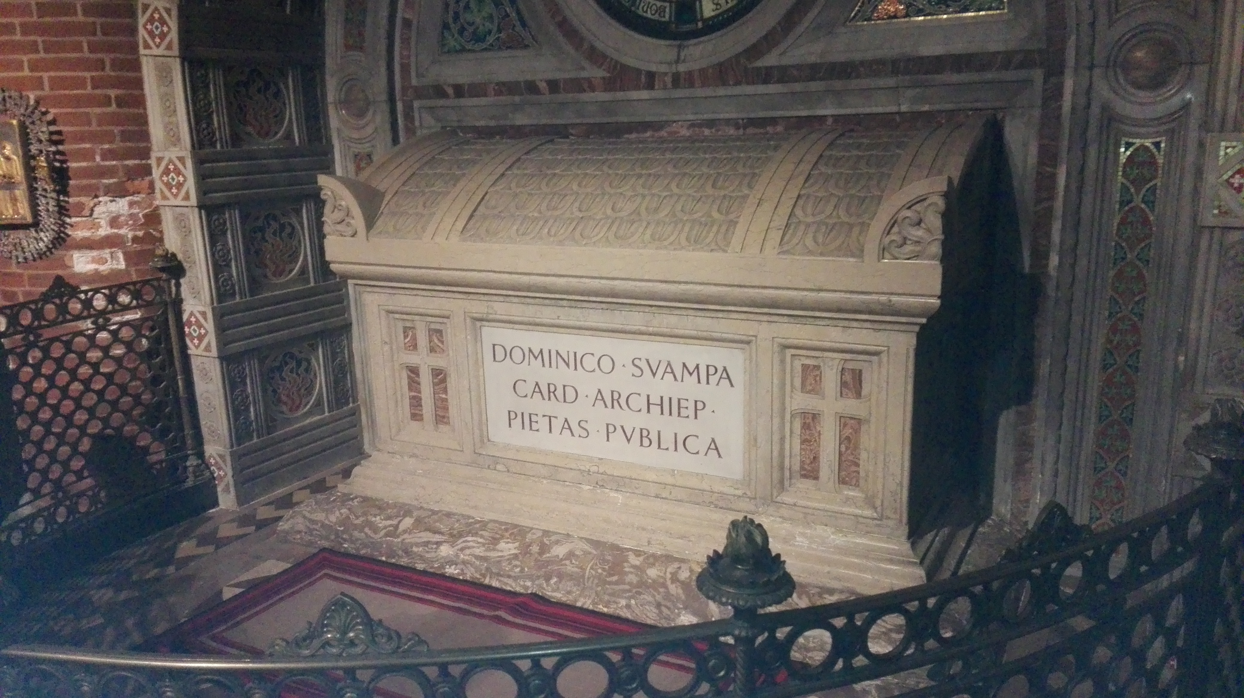 Sarcofago in marmo